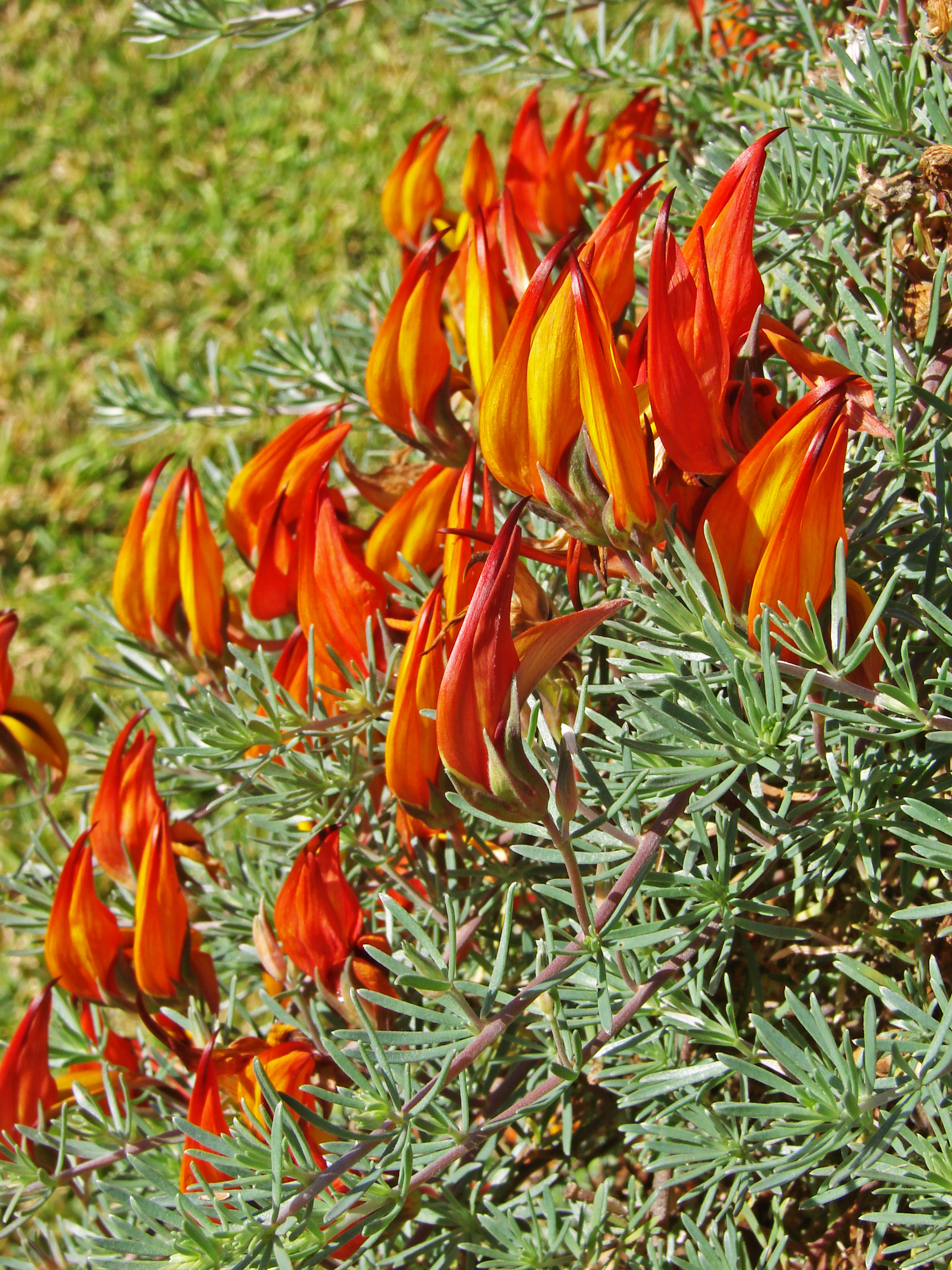 Lotus maculatus, mehrere Blüten, La Orotava, Teneriffa